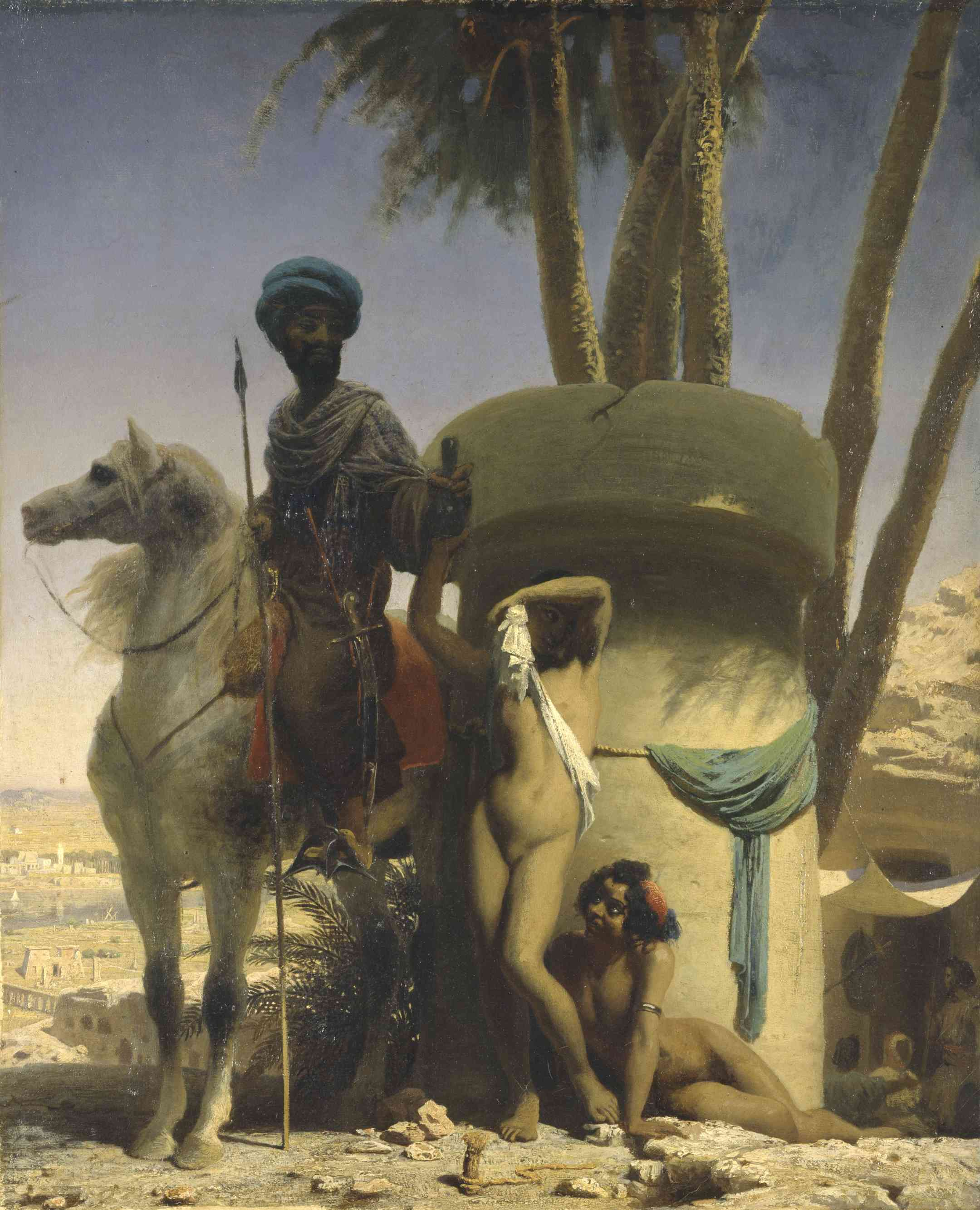 Charles Gleyre, La Pudeur égyptienne, 1838, huile sur toile, 77,5 x 63,5cm, Lausanne, musée cantonal des beaux-arts.